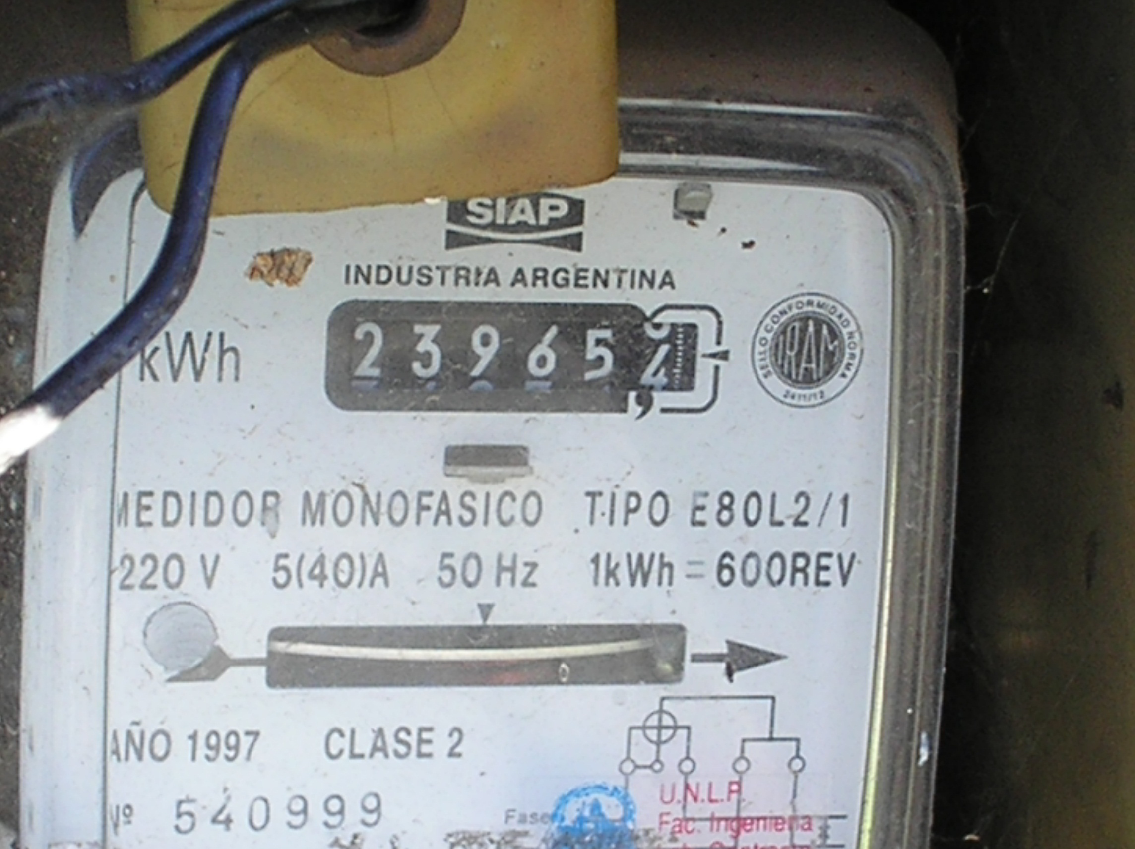 Medidor monofásico de consumo eléctrico